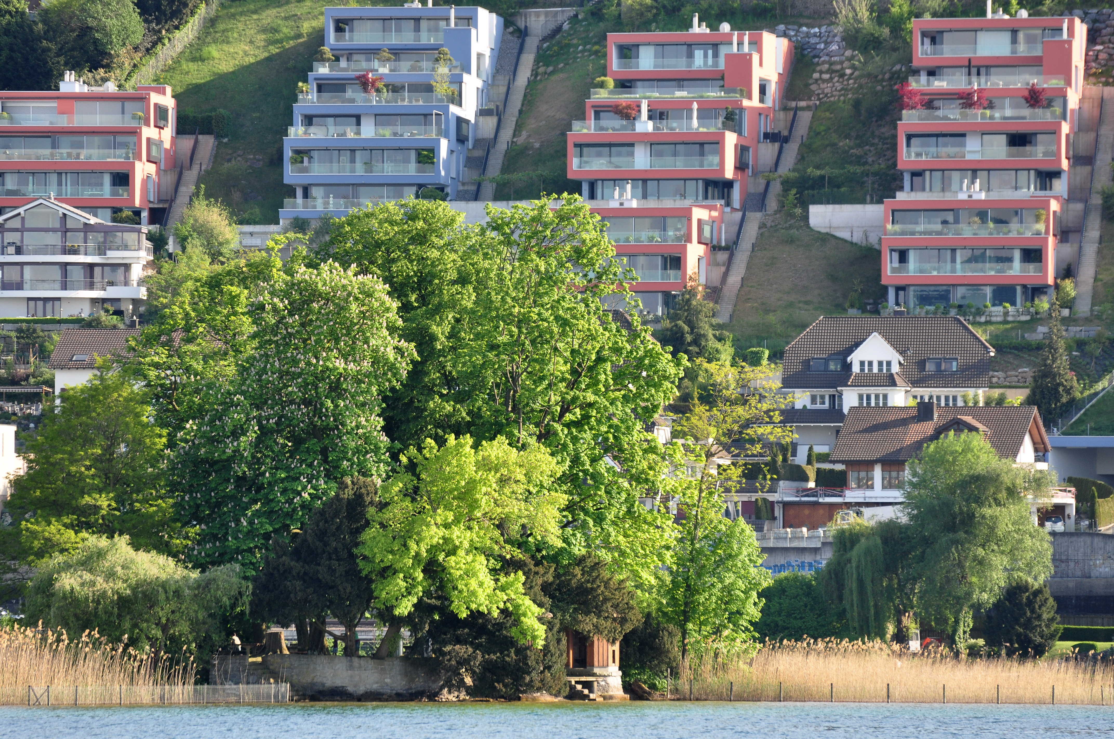 Schönenwirt island in Richterswil (Switzerland) as seen from ZSG paddle steamship Stadt Rapperswil